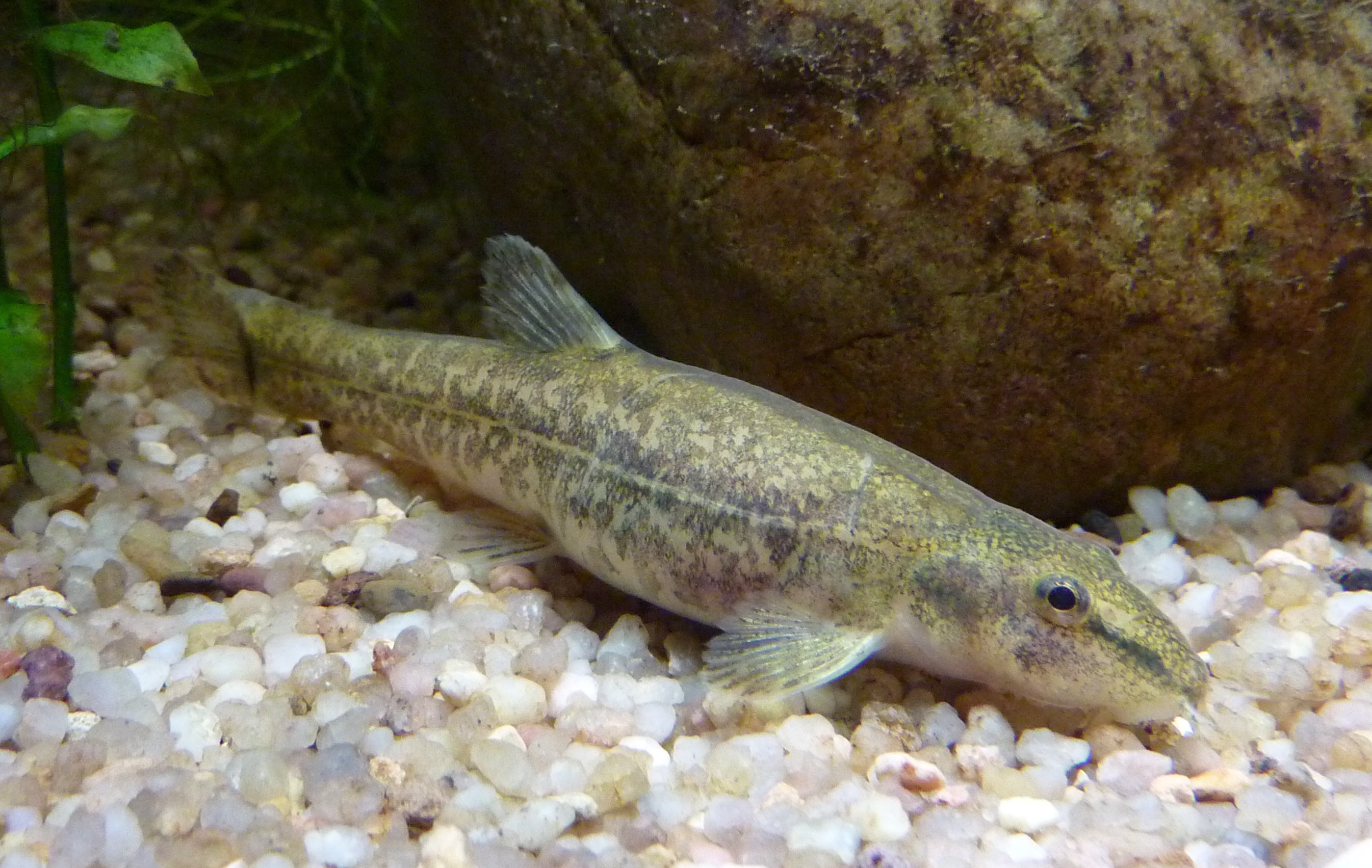 im Aquarium der Wilhelma